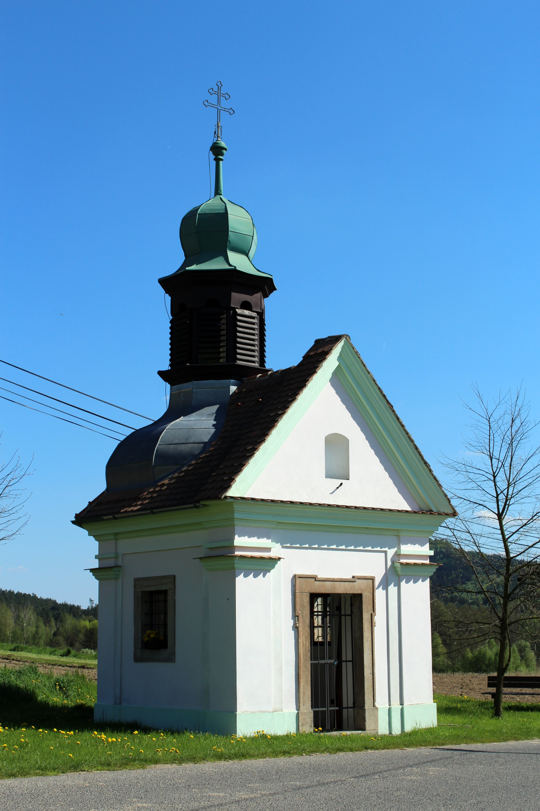 Velenice